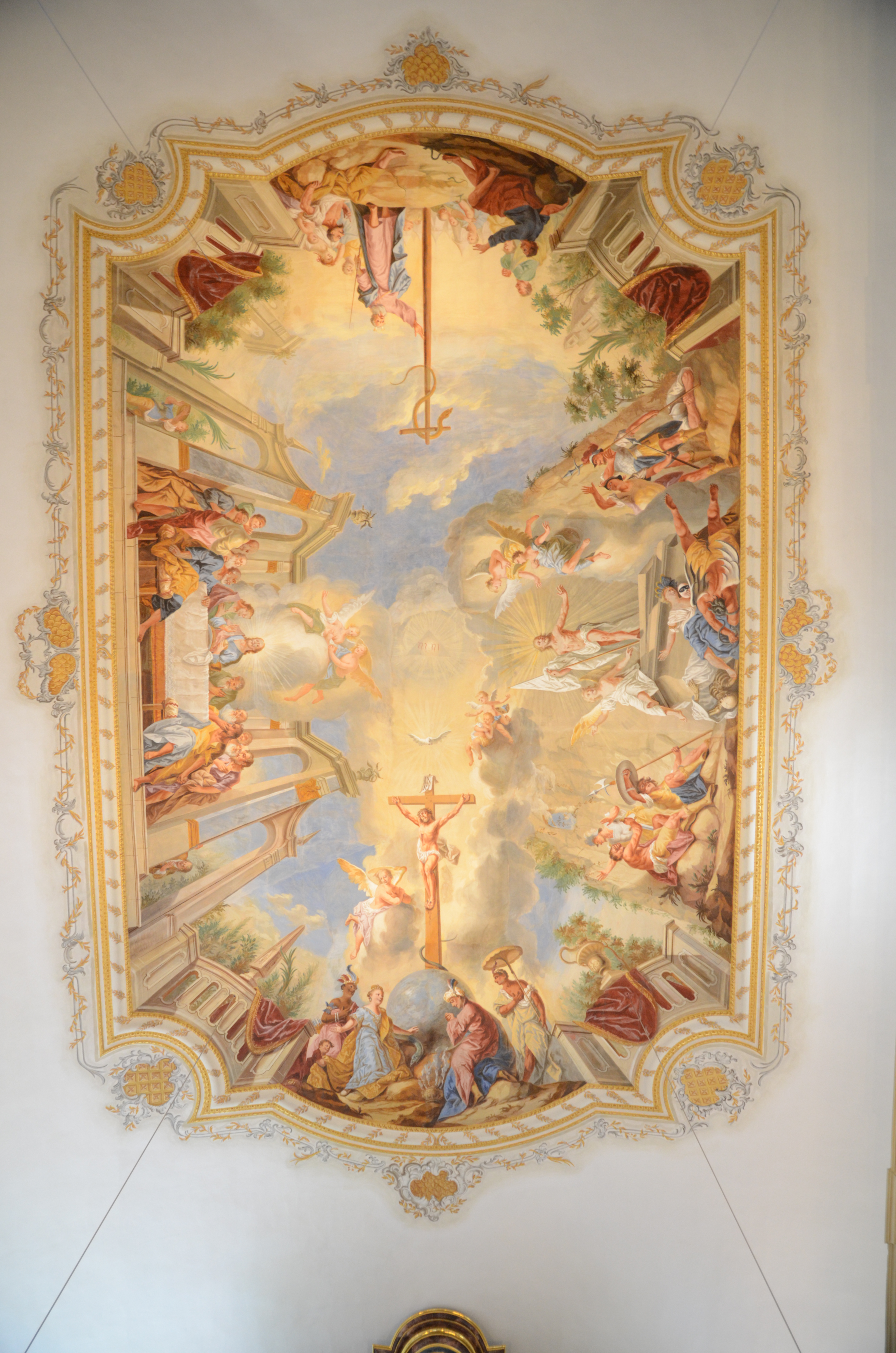 Spitalirche in Dinkelsbühl, Innenausstattung